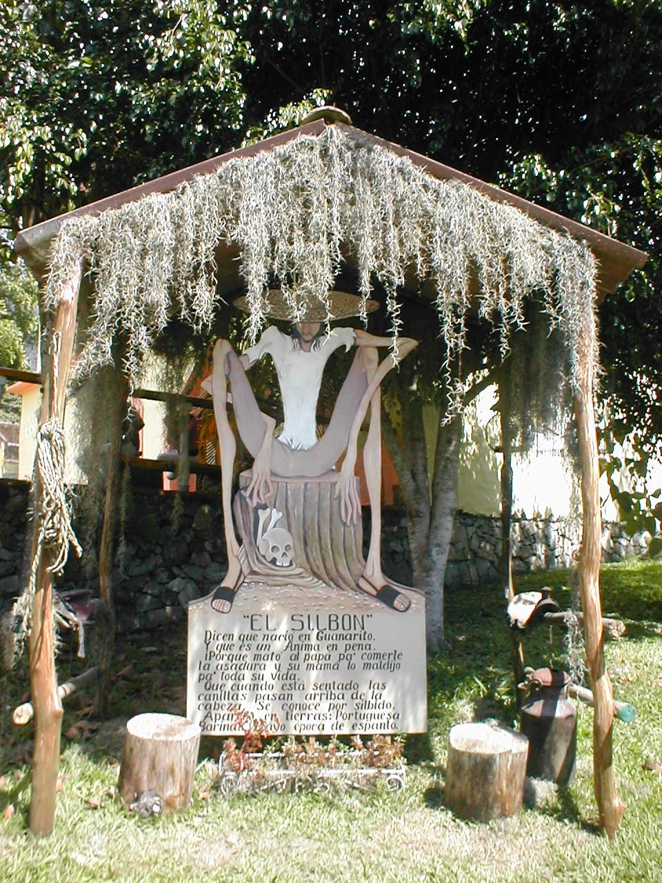 El Silbón es uno de los espantos más famosos de Venezuela. Esta fotografía fue tomada en parque temático Alexis y la Venezuela de Antier, estado Mérida.